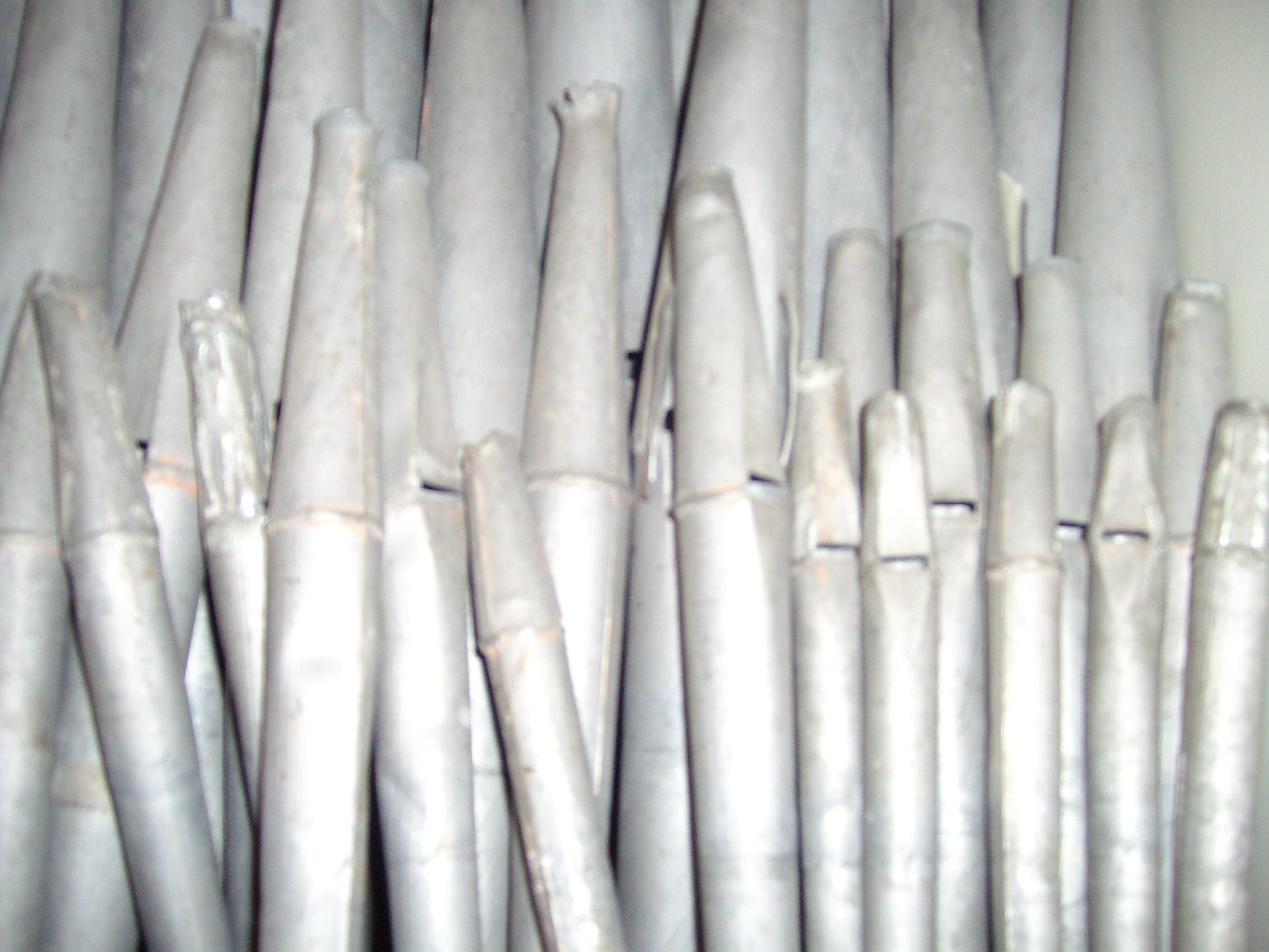 Mixturpfeifen der Buttforder Orgel während der Restaurierung bei Ahrend